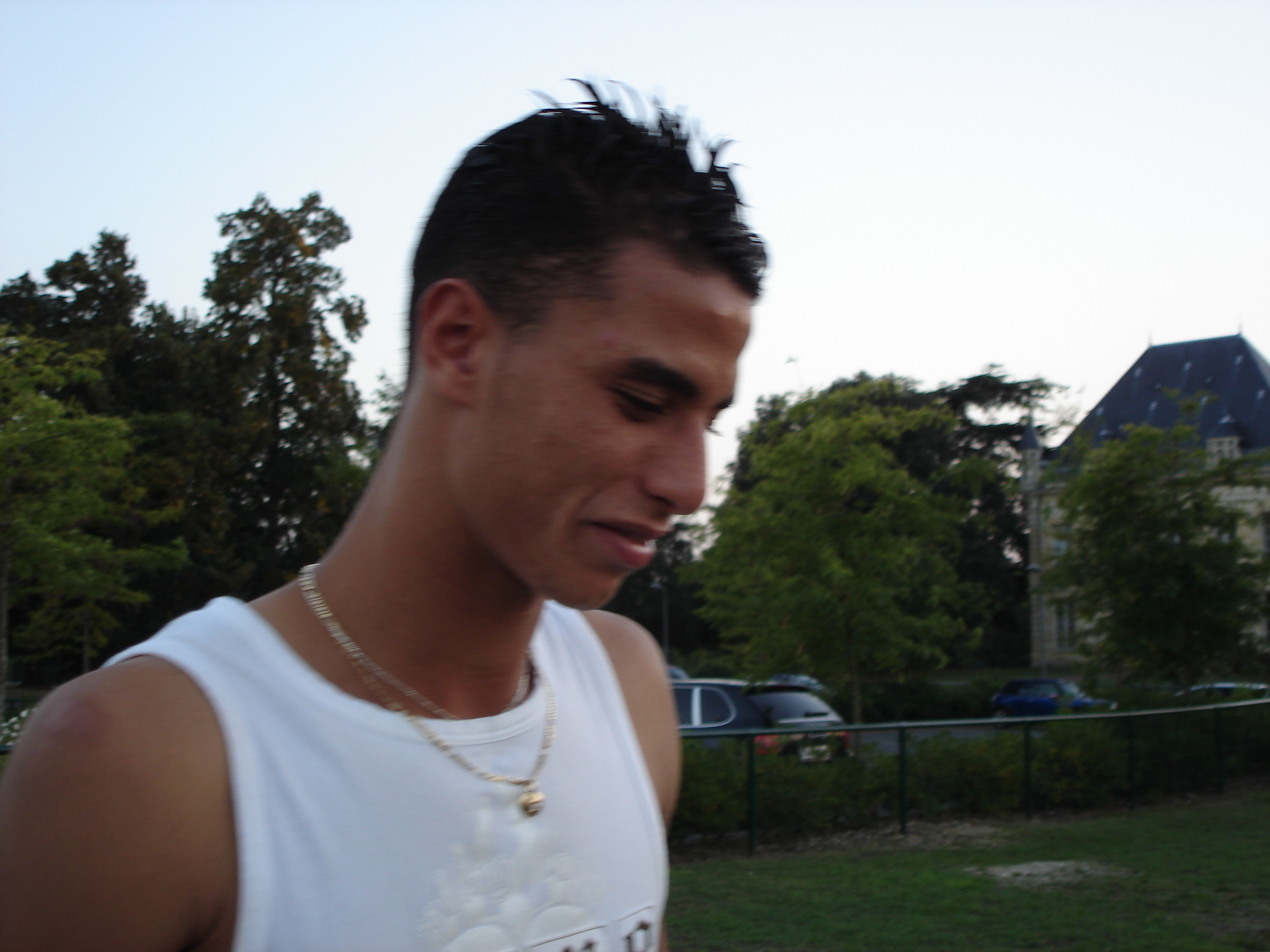 Marouane Chamakh, joueur des Girondins de Bordeaux